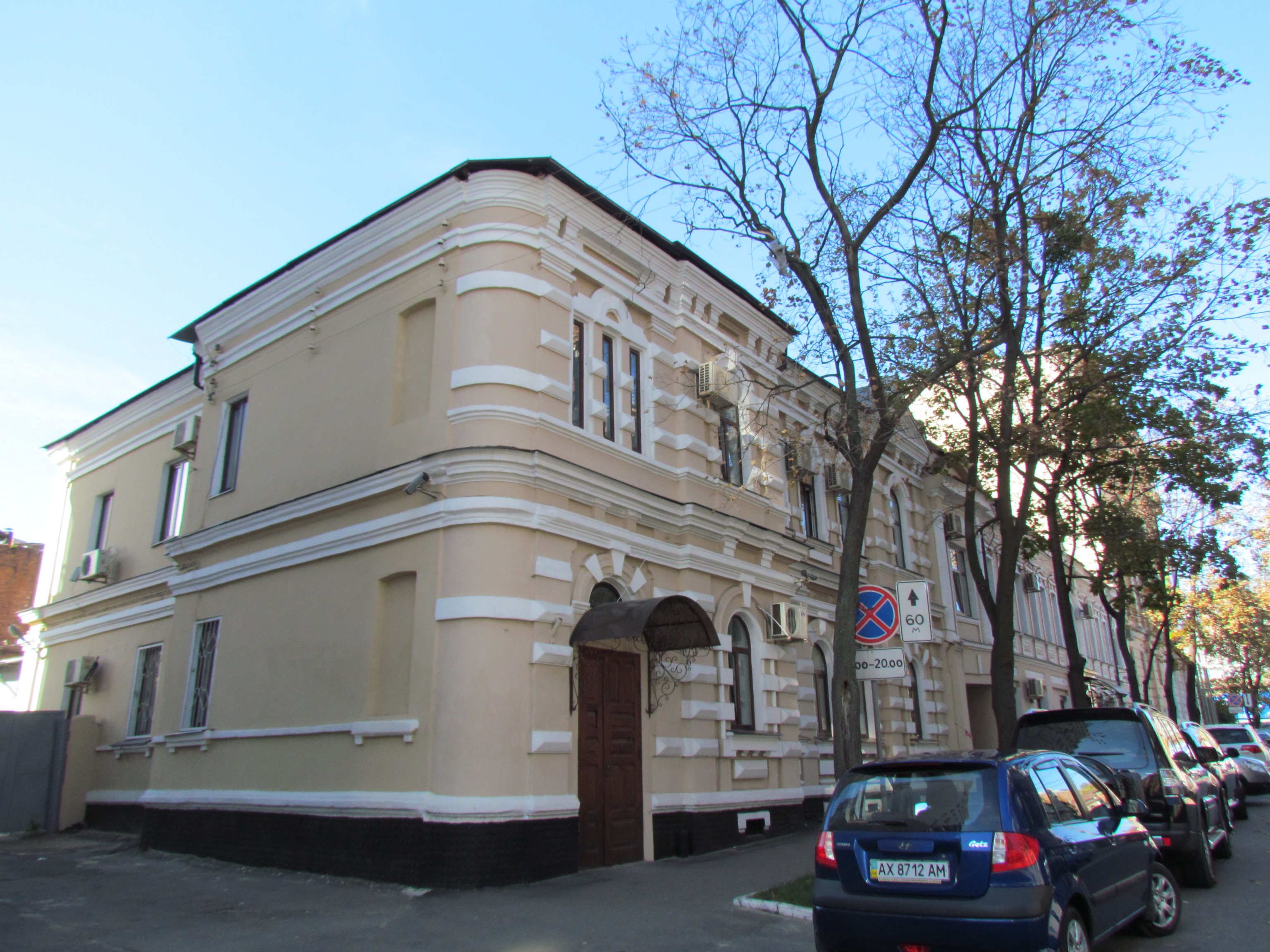 Україна, Харків, вул. Короленка, 16-а